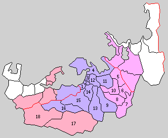 福井県遠敷郡の町村制時点の町村。